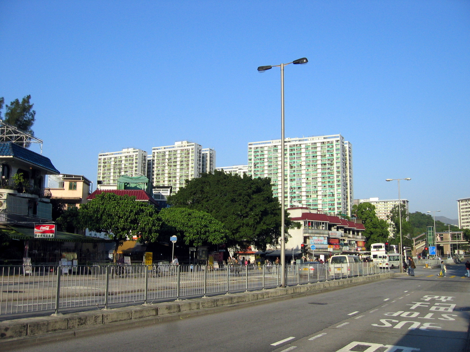 Tai Wai Sun Chui Estate & Tin Sam Wai